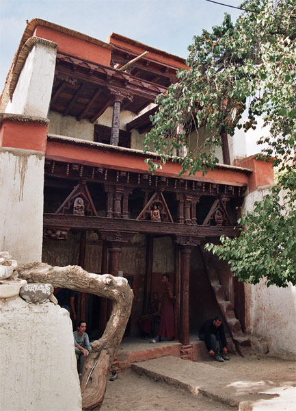 Alchi Choskhor, Temple de Sumtseg. Ladakh, Jammu i Caixmir, Índia